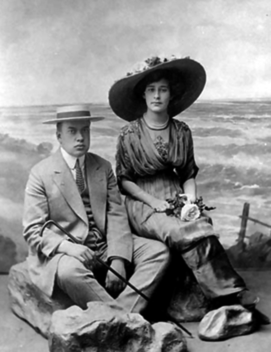 Павел Афанасьевич Бурышкин с женой в Ялте